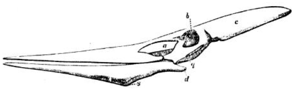 Pteronodon